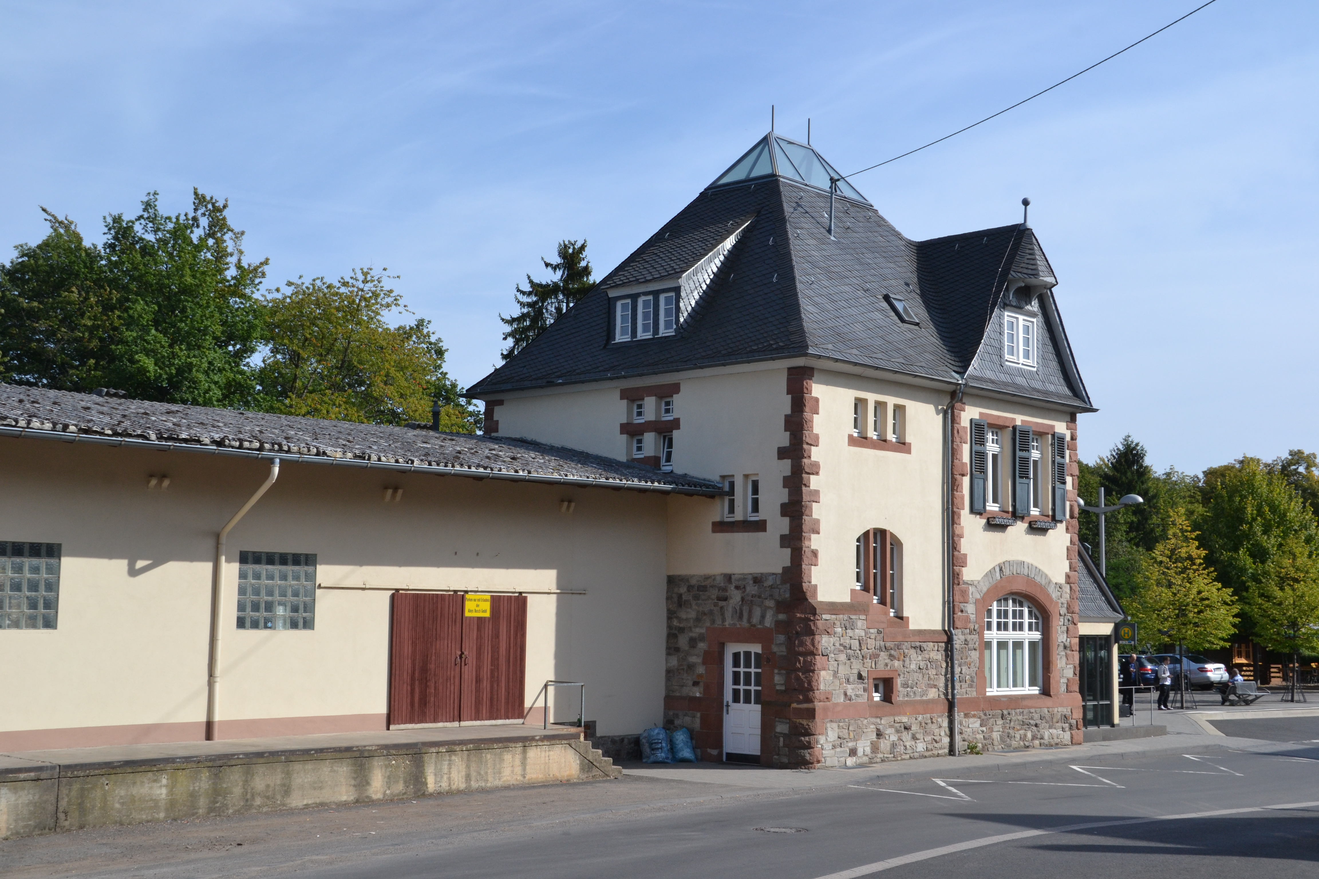 Emmelshausen, Bahnhofstraße 12: Bahnhof, 1908